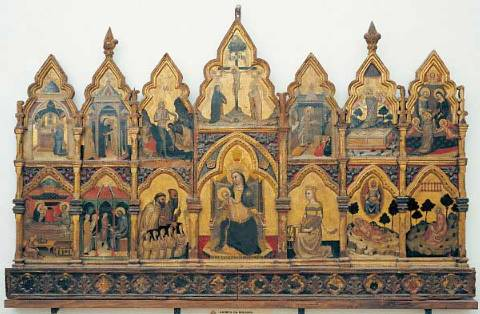 Impression digitale art : Andrea da Bologna, Vierge à l'enfant, Saint Benoît, Bruno et Catherine d'Alexandrie, Crucifixion et scènes de la vie de Jean de l'Eva